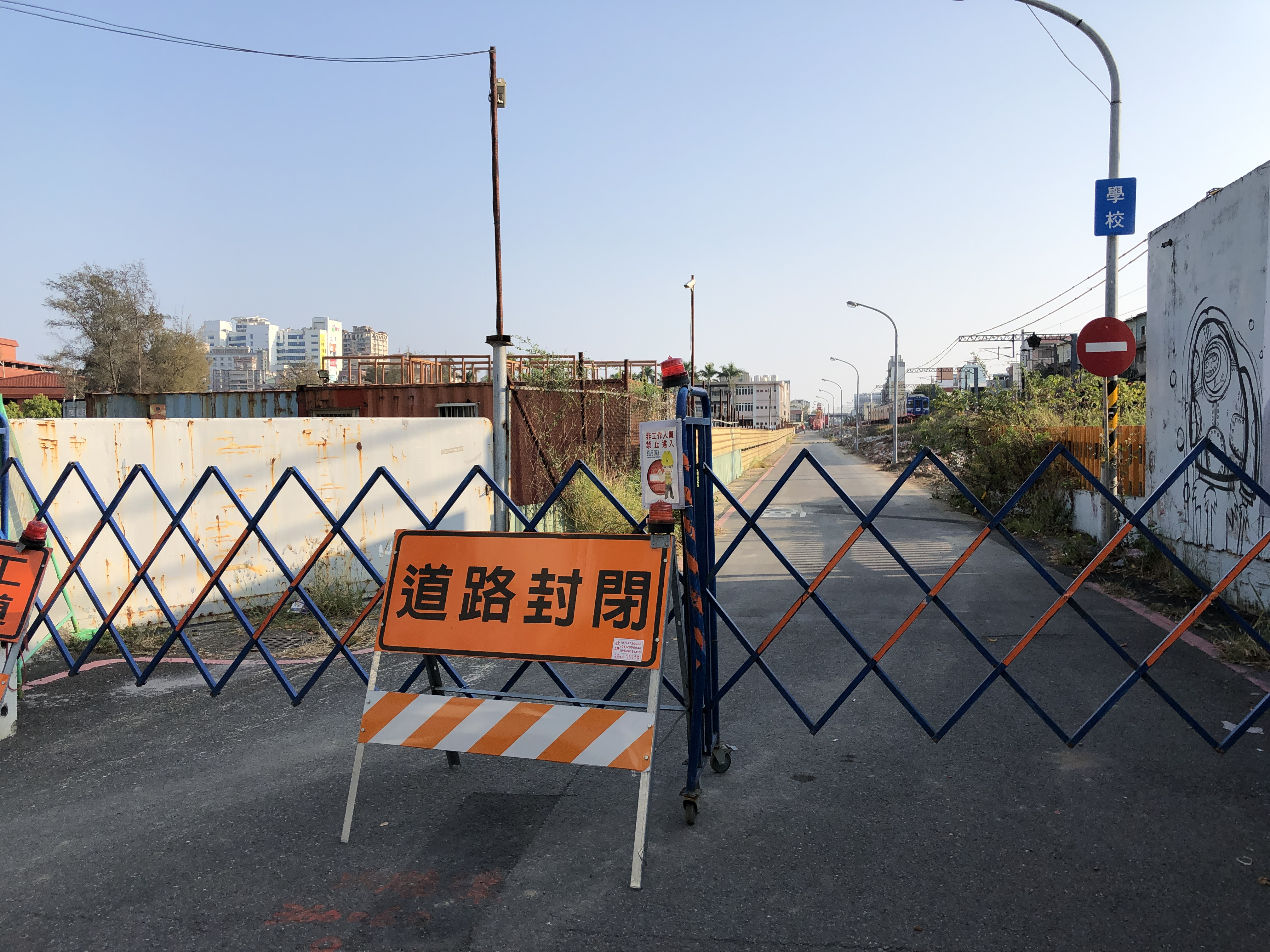 中文（台灣）: 臺灣鐵路管理局林森車站預定地現況。